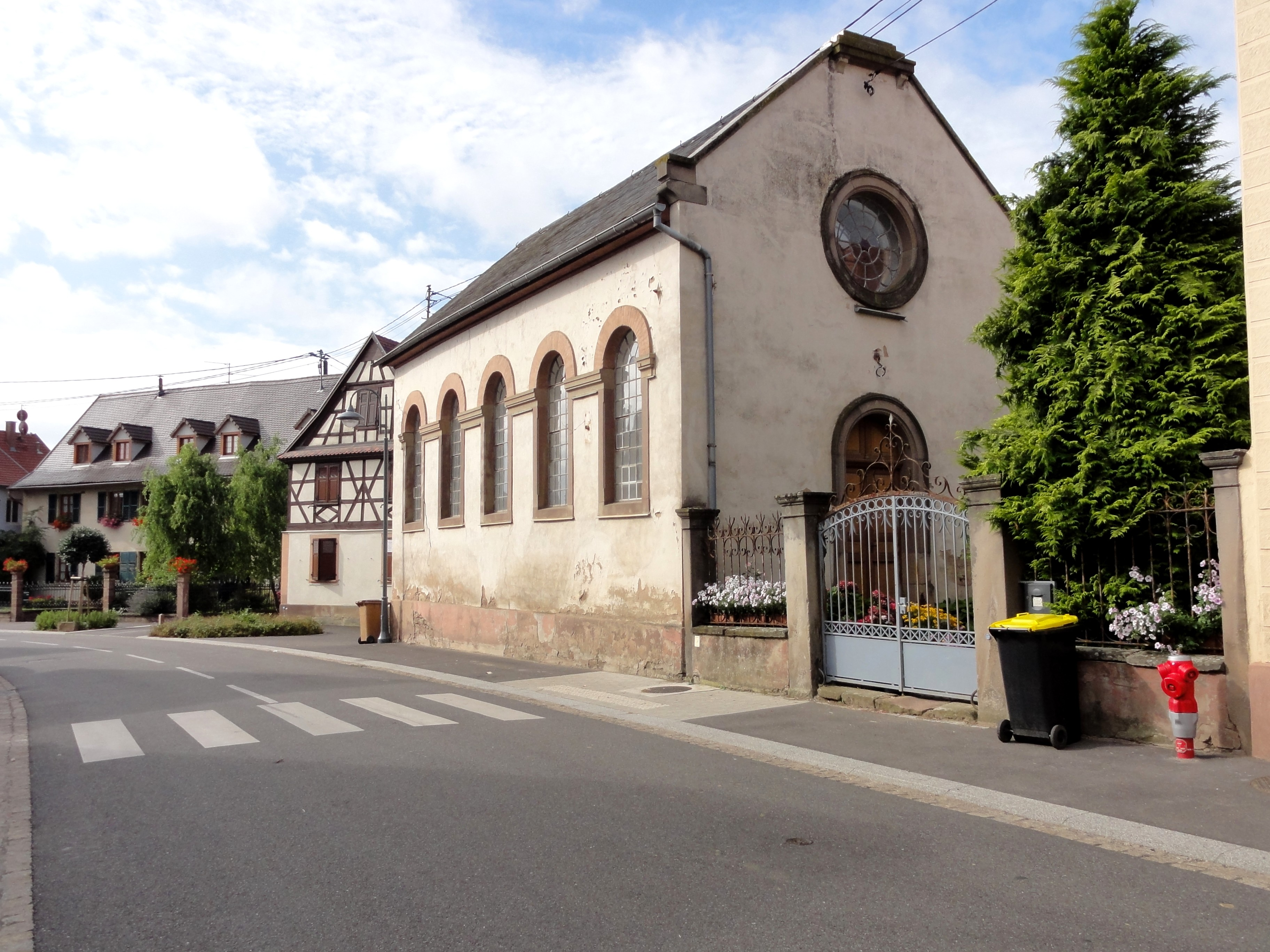 Alsace, Bas-Rhin, Wingersheim, Synagogue (1875): .